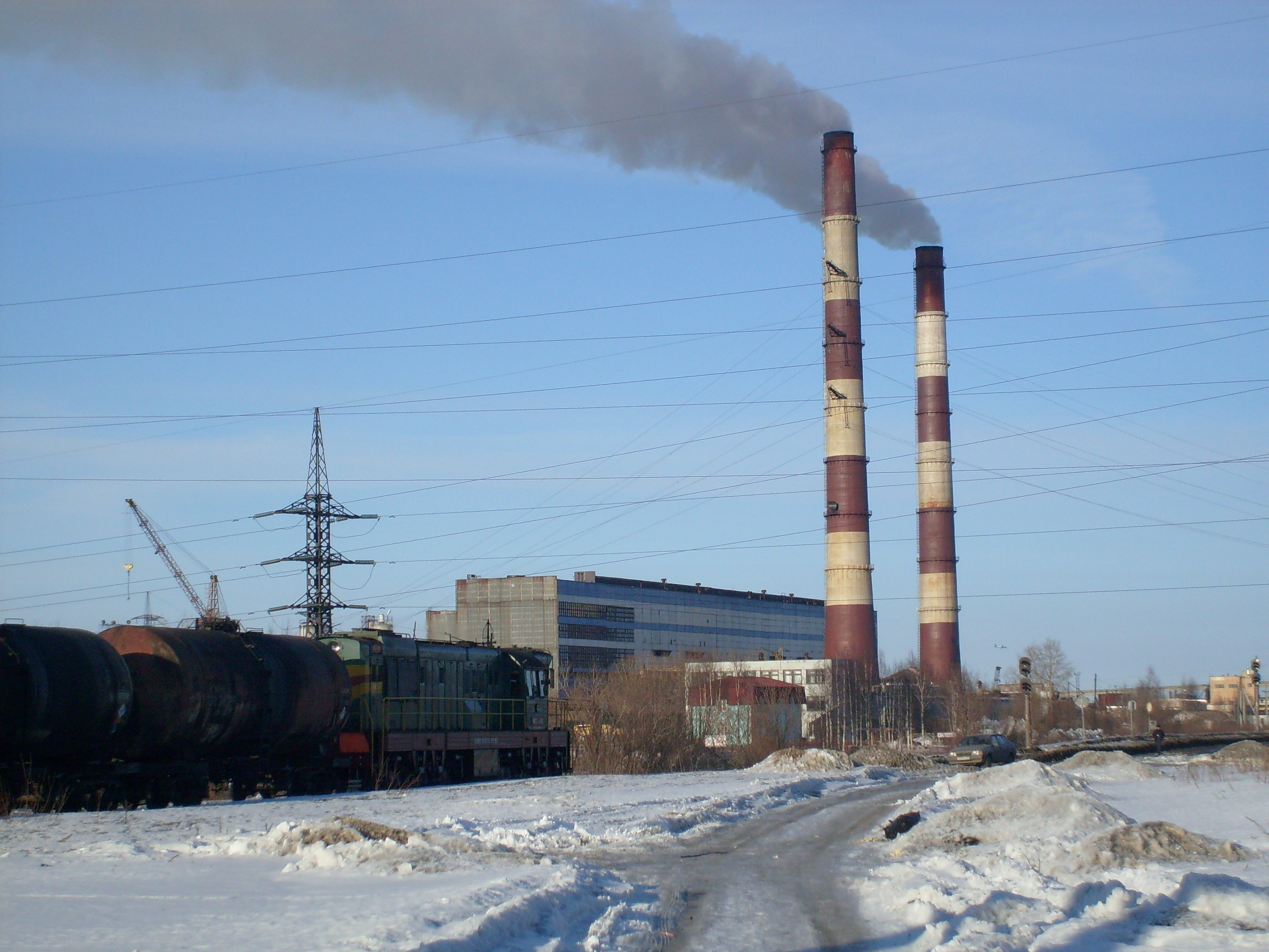 Архангельская ТЭЦ